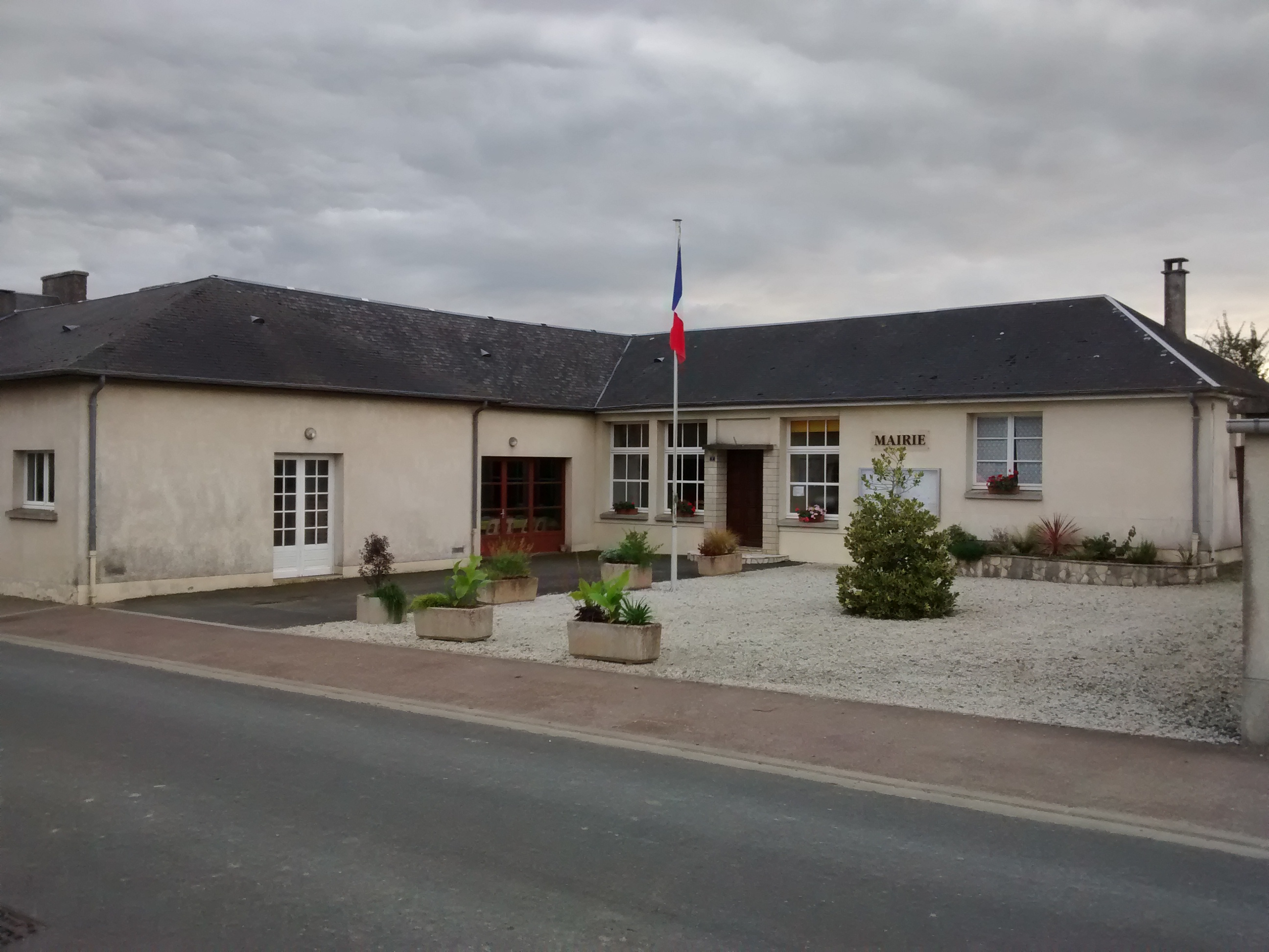 Soulles ,Manche